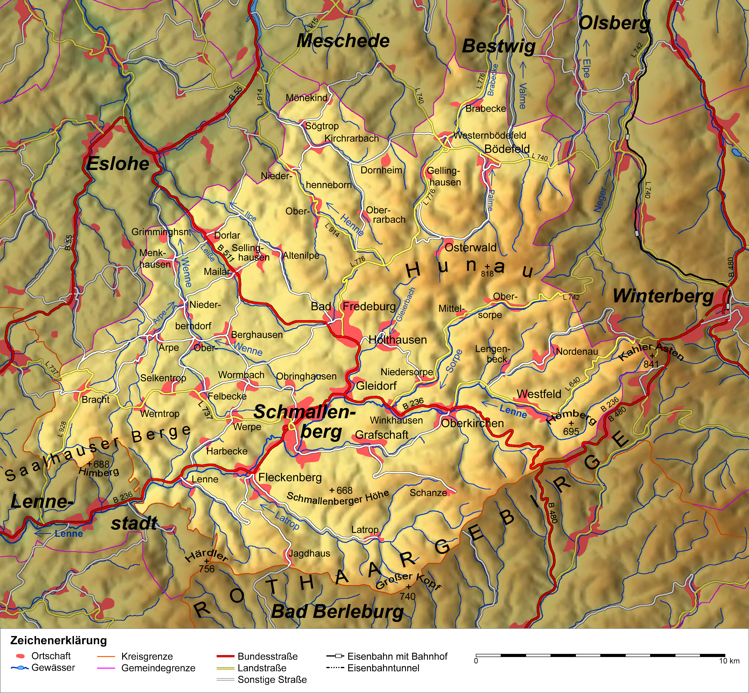 Topografische Karte von Schmallenberg / Stadtgebiet hervorgehoben